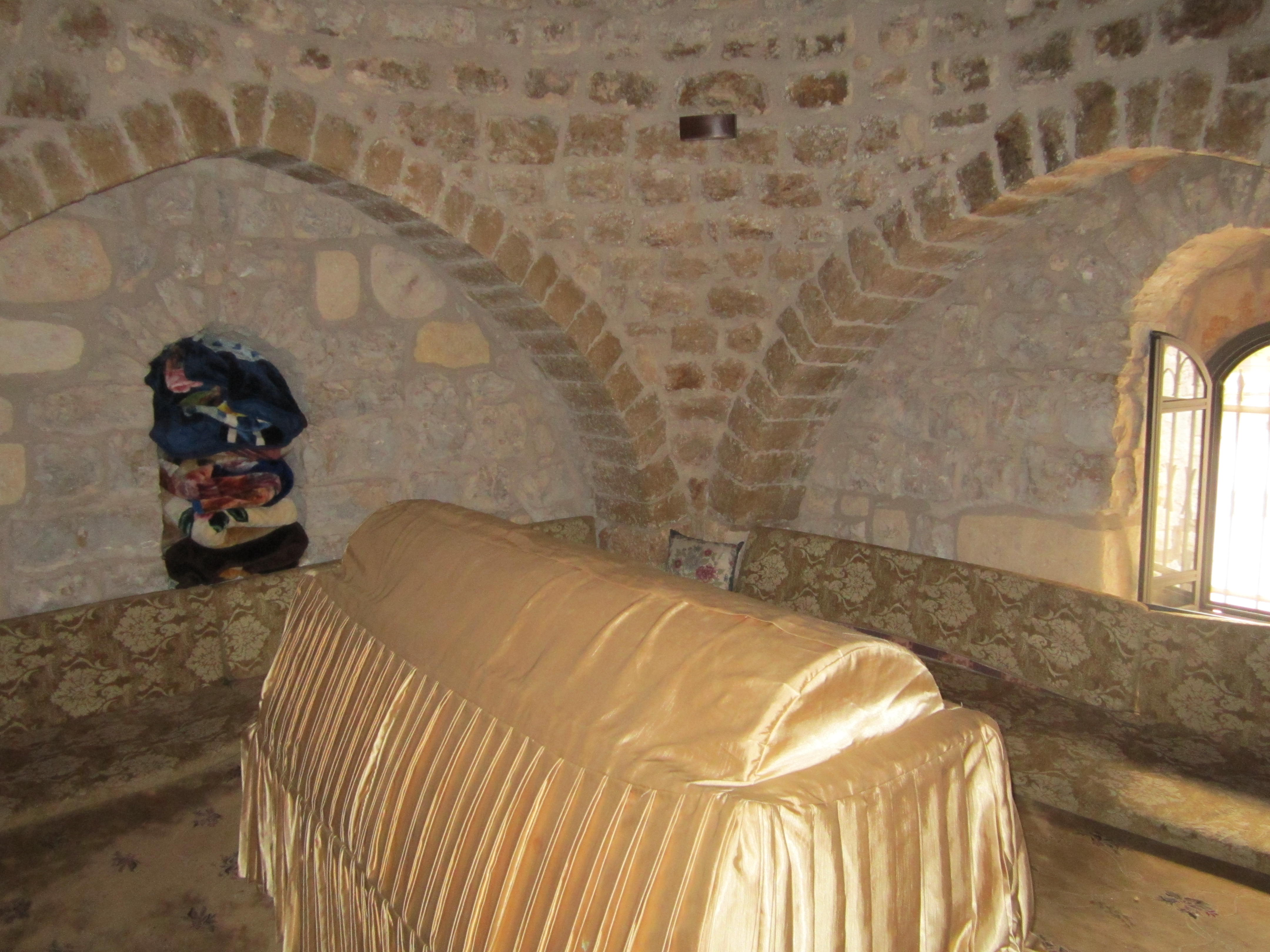 קבר חושי הארכי - ירכא, רעו של דוד המלך